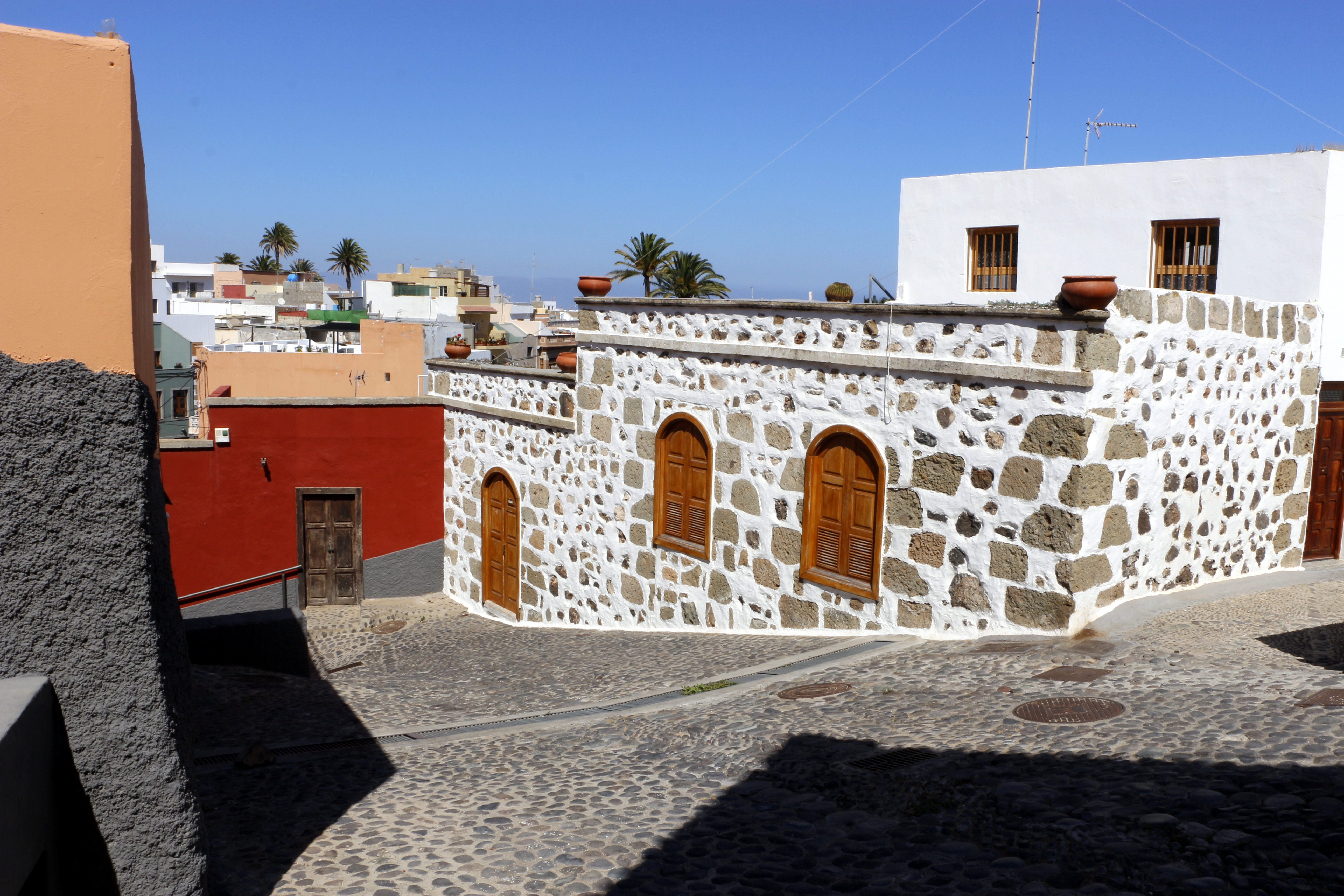 Calles empredadas en el casco histórico de Ingenio